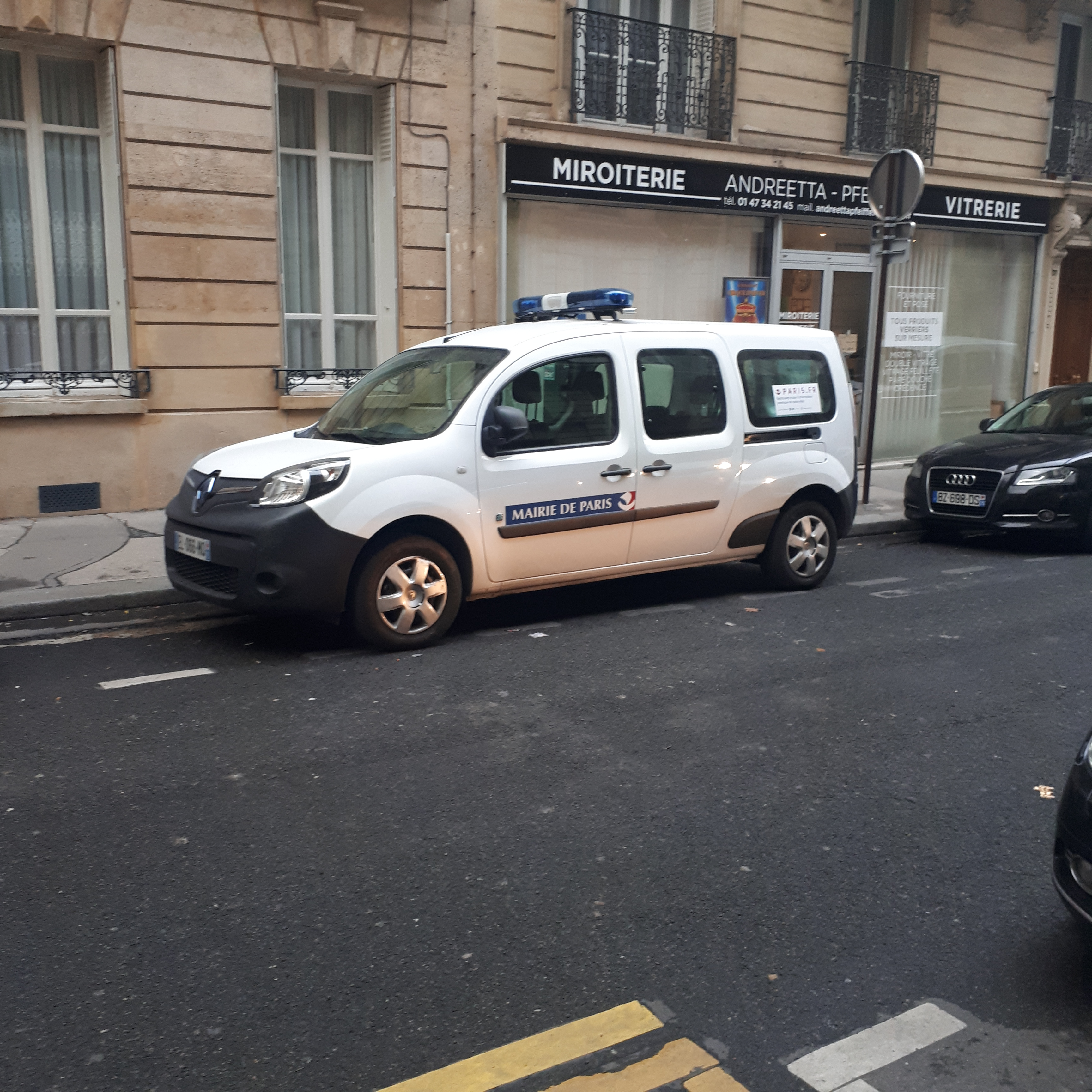 Voiture de la DPSP, mairie de Paris, avec gyrophare.